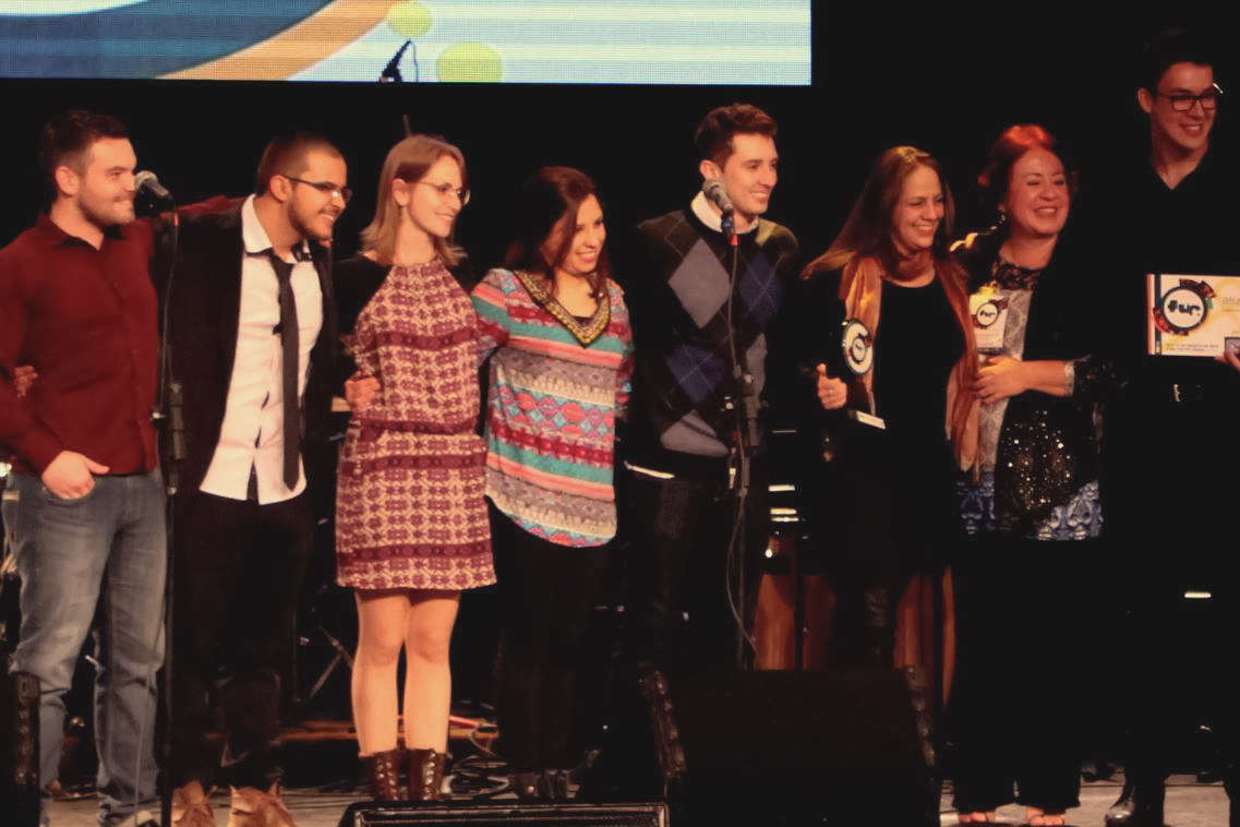 Premiação da fase regional do Festival Universitário da Canção (2015)